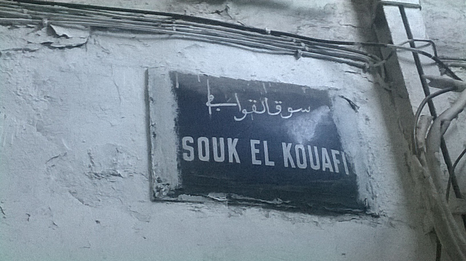 La médina de Tunis مدينة تونس العتيقة